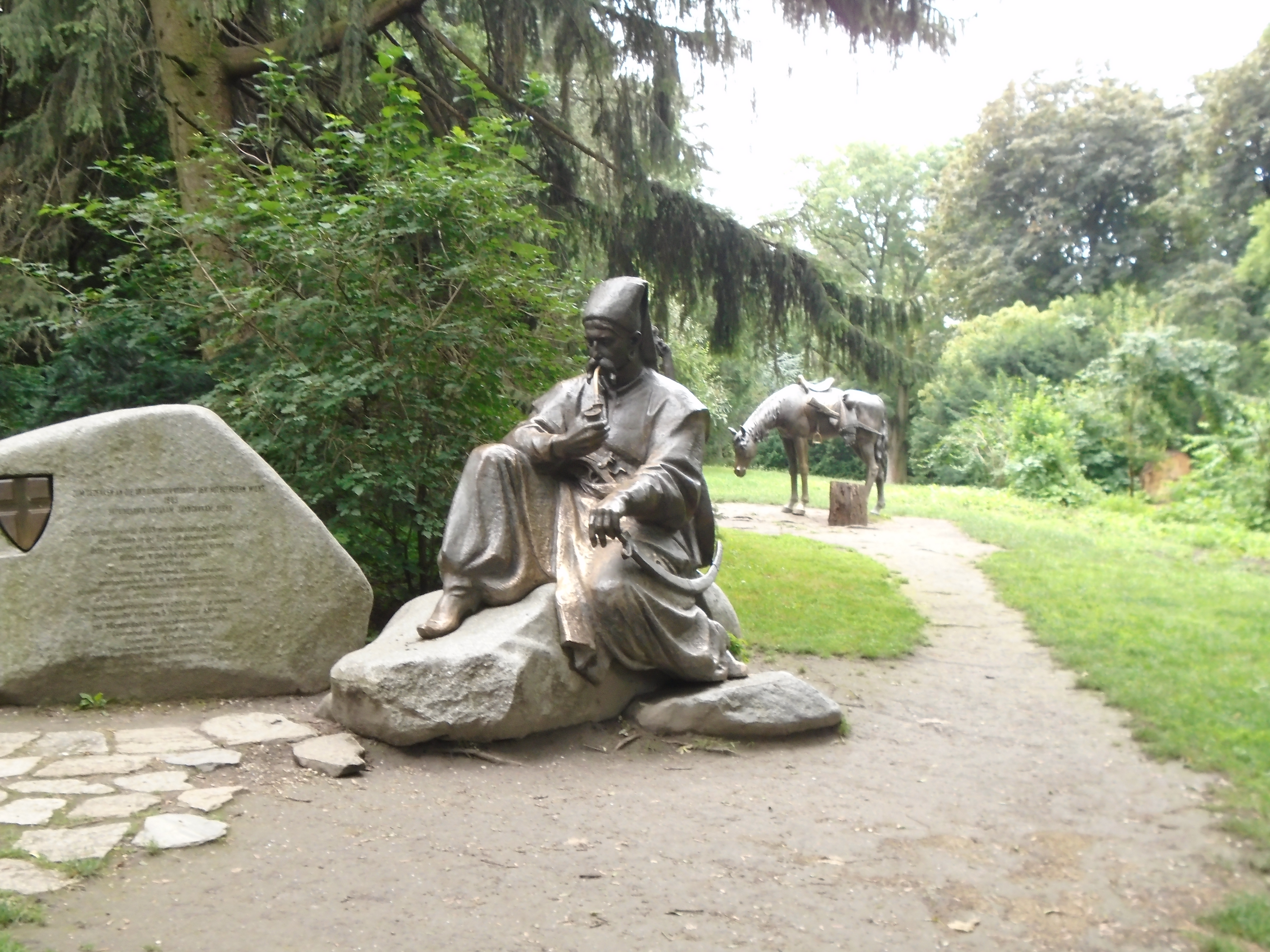 Das Kosakendenkmal im Wiener Türkenschanzpark mit grasendem Pferd